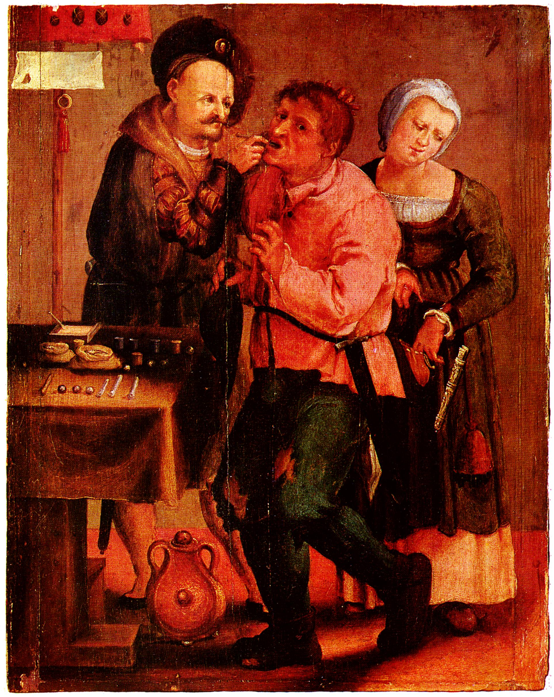 Medieval dentist removing tooth